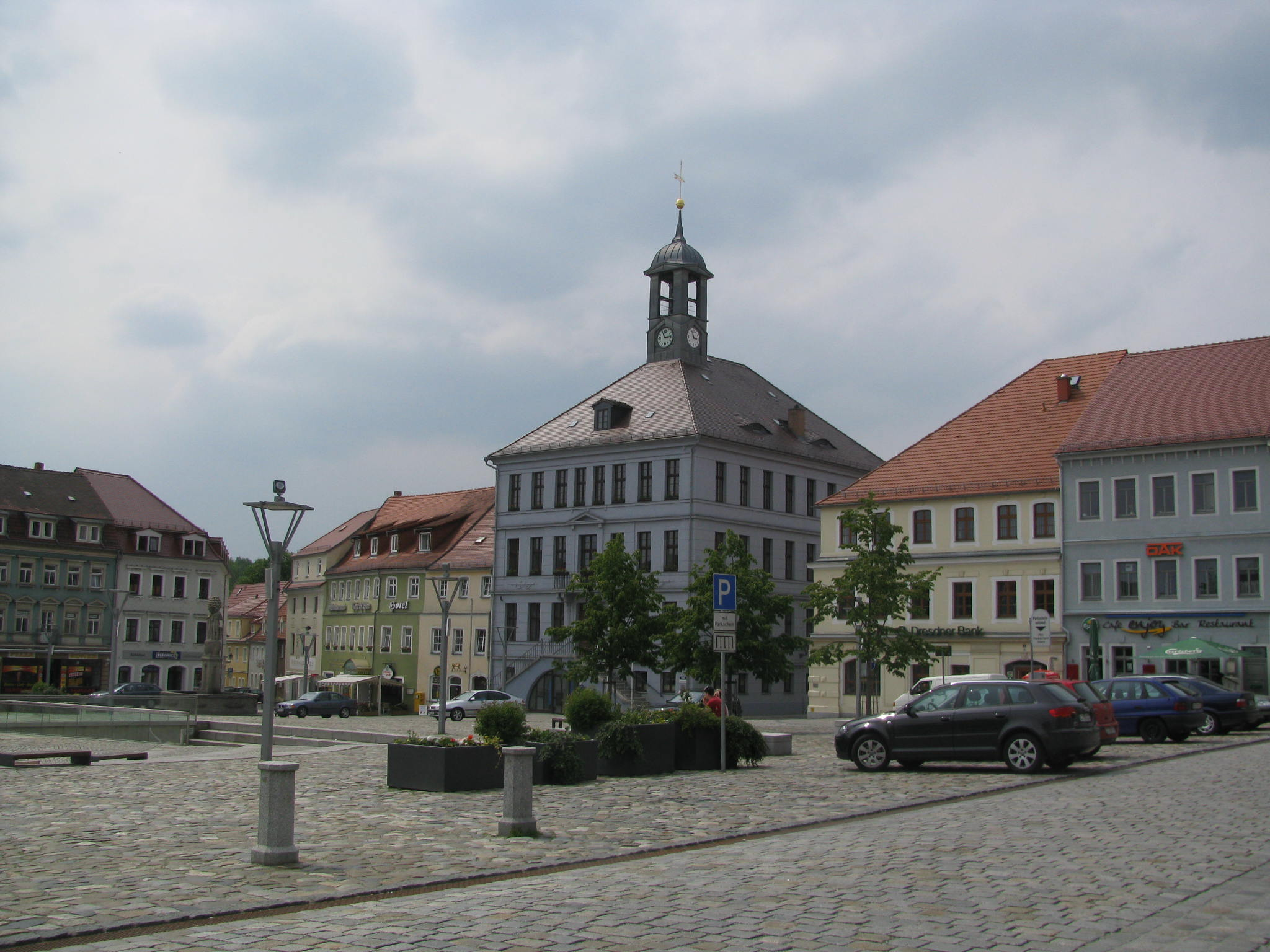 Bischofswerda